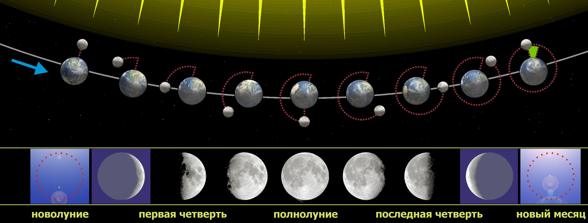 Связь фаз Луны с круговым движением вокруг Земли. Размер Земли и Луны, а их дистанция не действительные. На этом рисунке тоже просматриваются следующие вещи: синхронизированное вращение Луны, совместное вращение вокруг общего центра инерции, разность сидерического и синодического месяцев (зелёная отметка), наклон оси вращения Земли. (Замечание: в моменте новолуния только солнце проглядывается.)